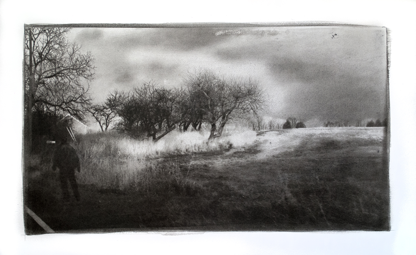 Photographie prise dans les Cantons de l'Est représentant de vieux pommiers et faisant usage de la gomme bichromatée.